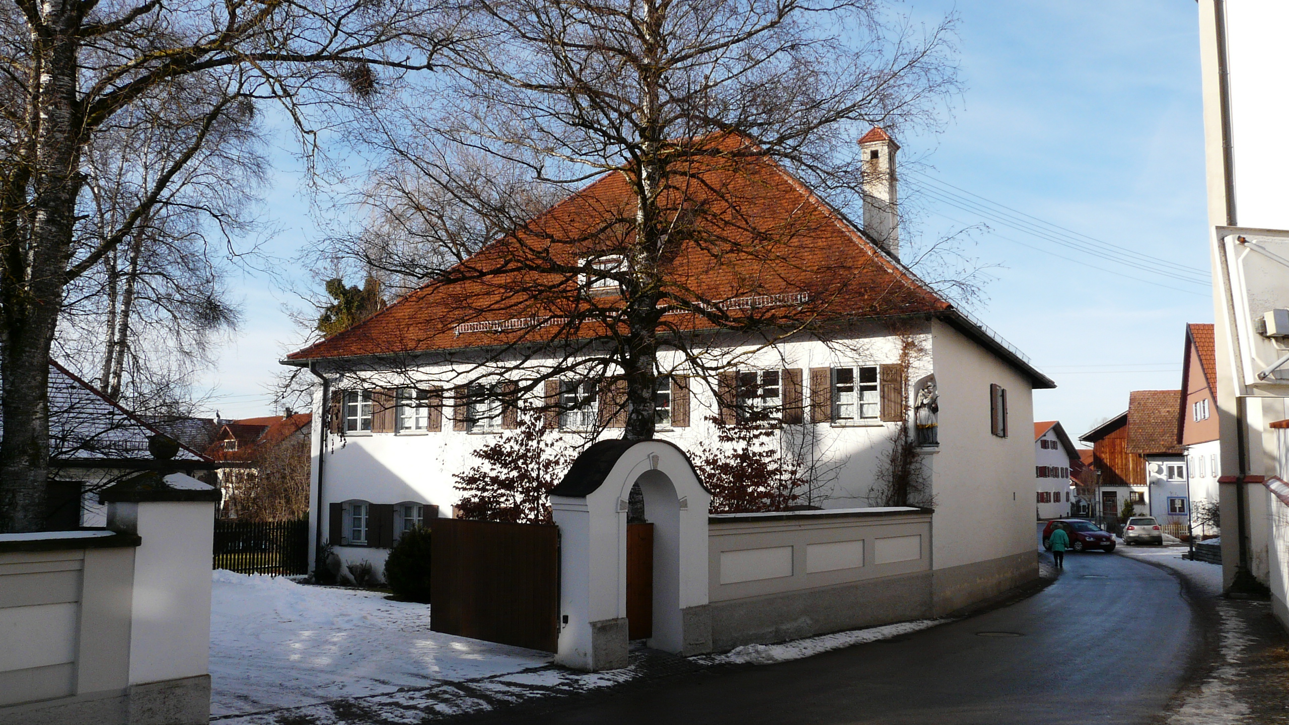 Dorfstr. 13 in Stötten a. A.